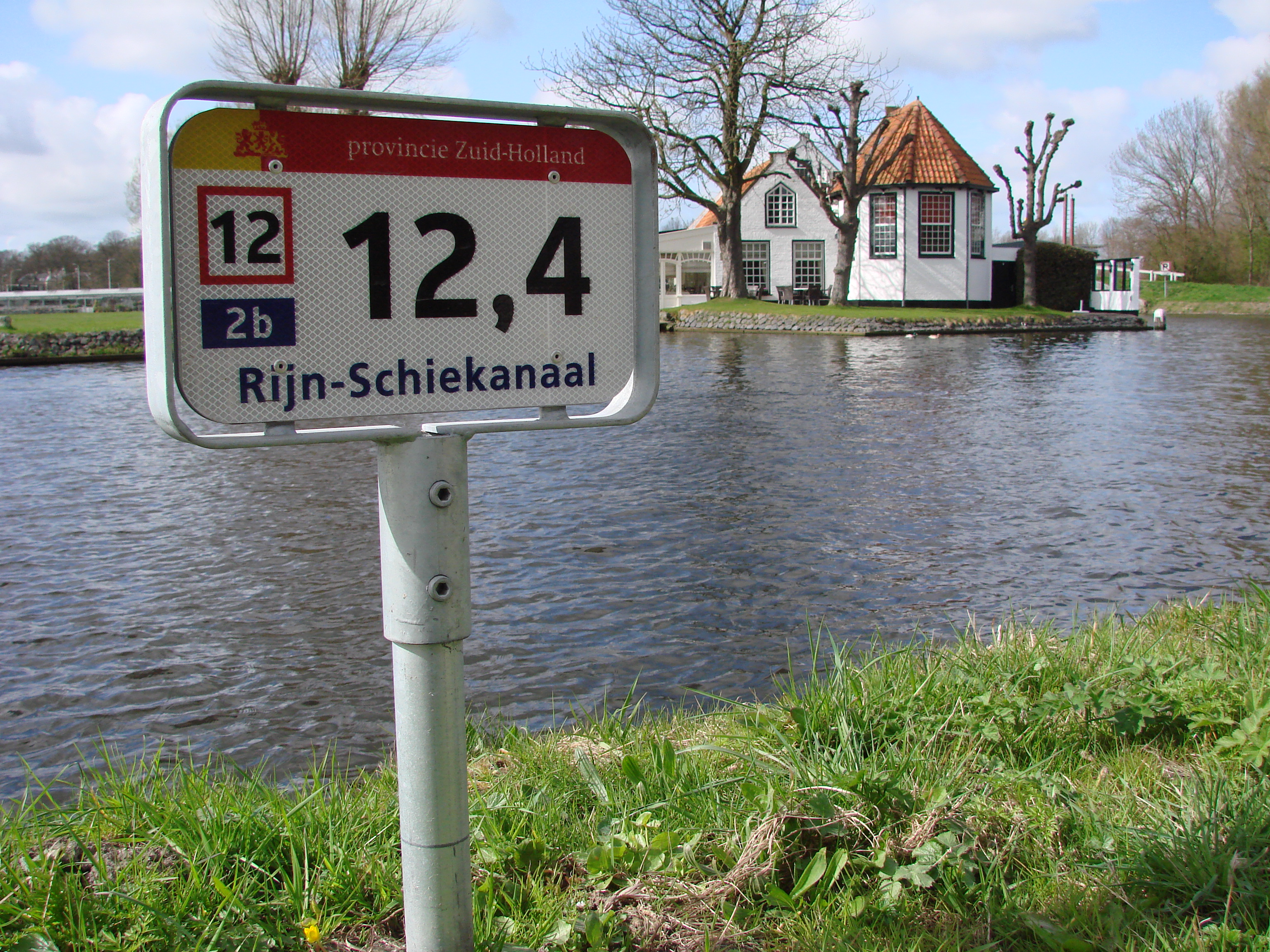 Hectometerpaal 12,4 langs de Vliet bij Voorschoten. Op de achtergrond Restaurant Allemansgeest.